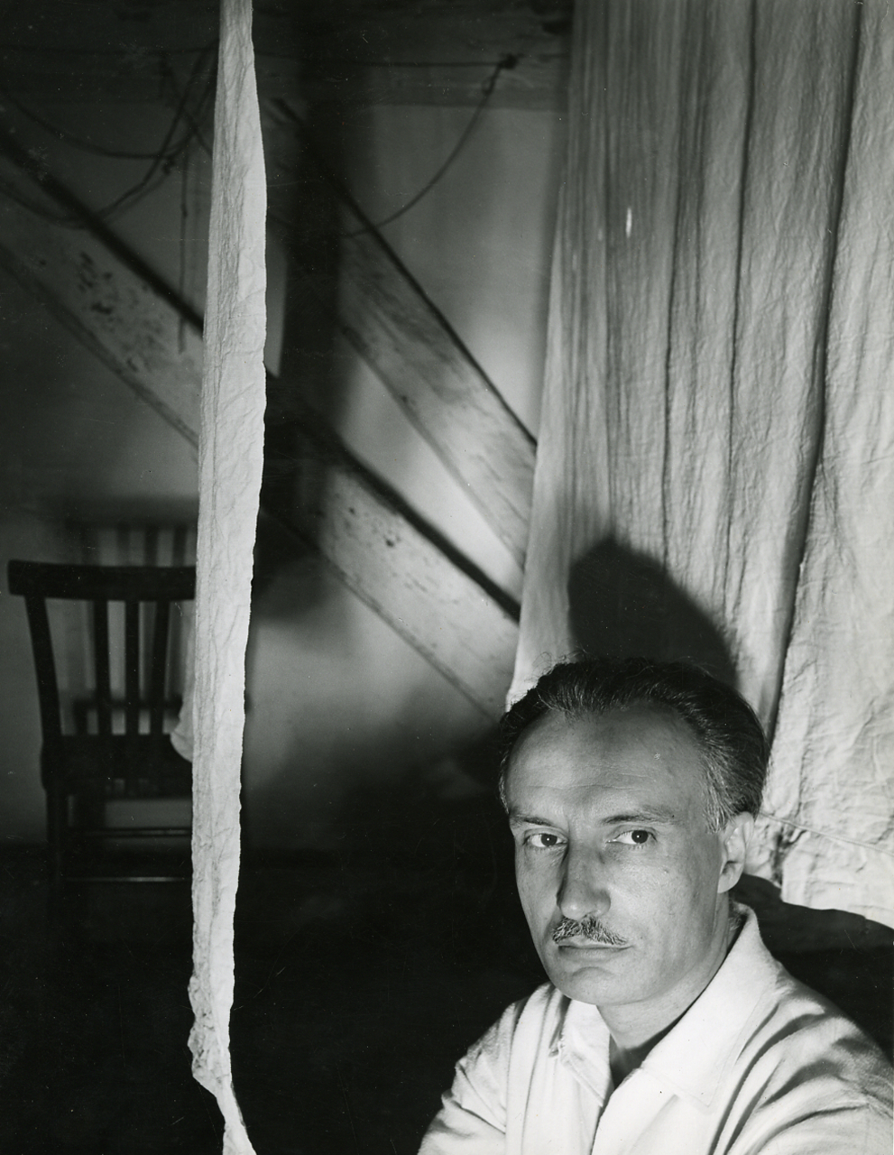 Serie fotografica : Italia, 1953 / Paolo Monti. - Stampe: 1 : Positivo b/n, gelatina bromuro d'argento/ carta, 24x30. - ((Al verso della stampa iscrizione didascalica e documentaria manoscritta a matita: "Autoritratto 1953"; timbro a inchiostro con copyright (Corso Sempione - Milano). - Cartellina di cartone con stampe di vario formato (24x30 e 30x40) utilizzate dall'Istituto di Fotografia Paolo Monti per una mostra a Varese; sul fronte della cartellina iscrizione documentaria manoscritta a pennarello nero: "Varese/ mostra". - Tutte stampe contenute nella cartellina di cartone intitolata "Varese/ Mostra" sono state esposte in una mostra a Varese nel 2008.